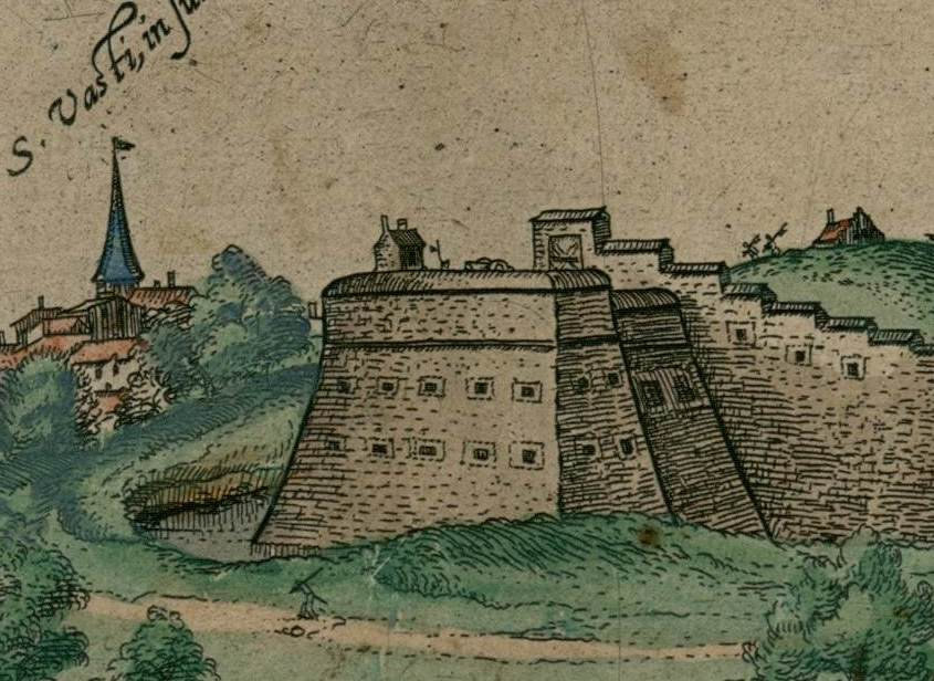 Détail du bastion de la porte neuve.